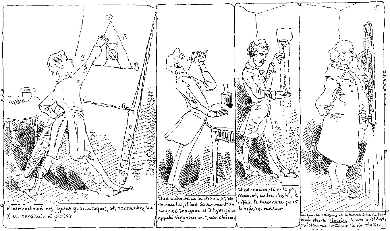 Histoire d'Albert-page 07